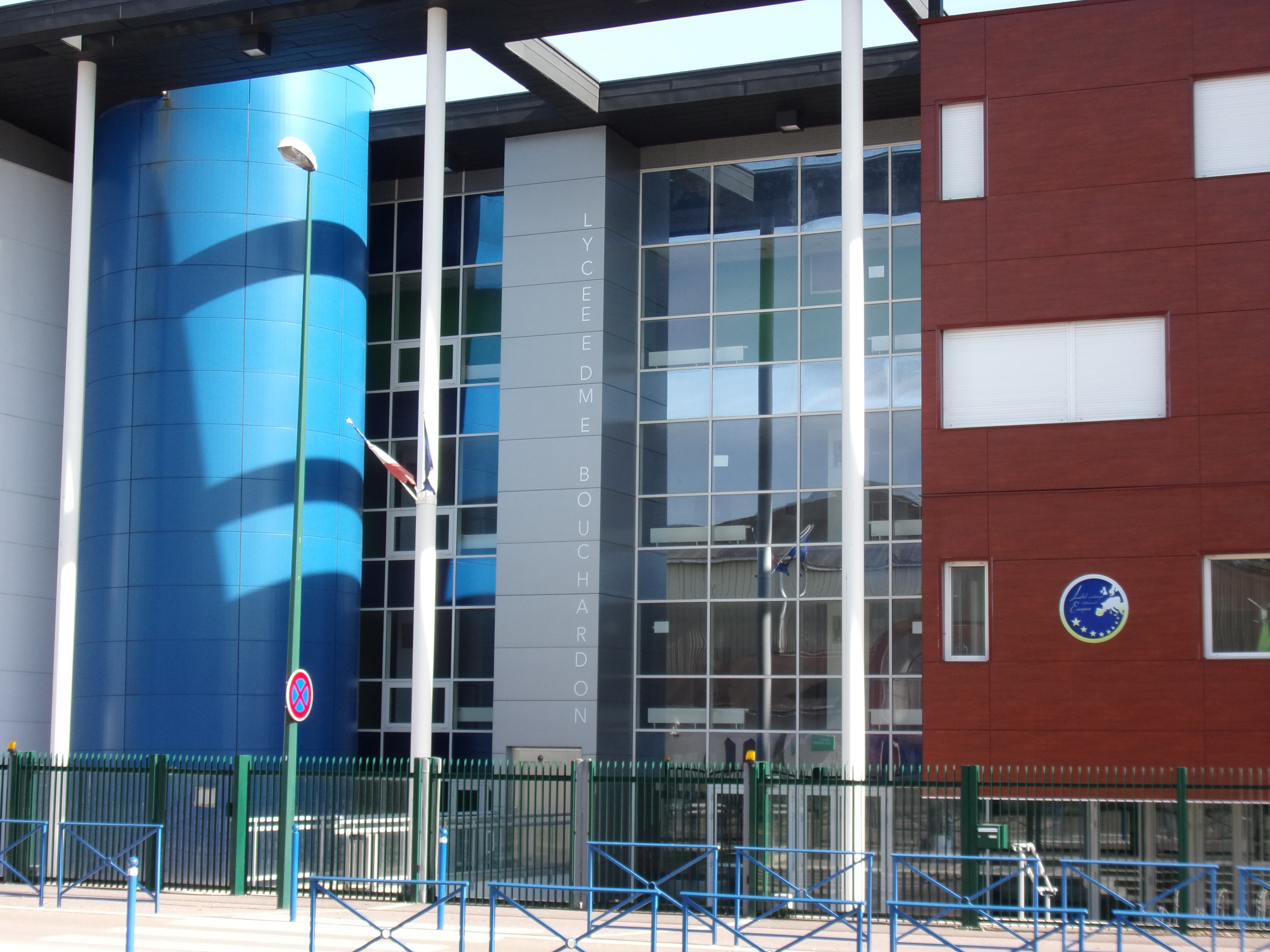 Entrée du Lycée Bouchardon à Chaumont (Haute-Marne).